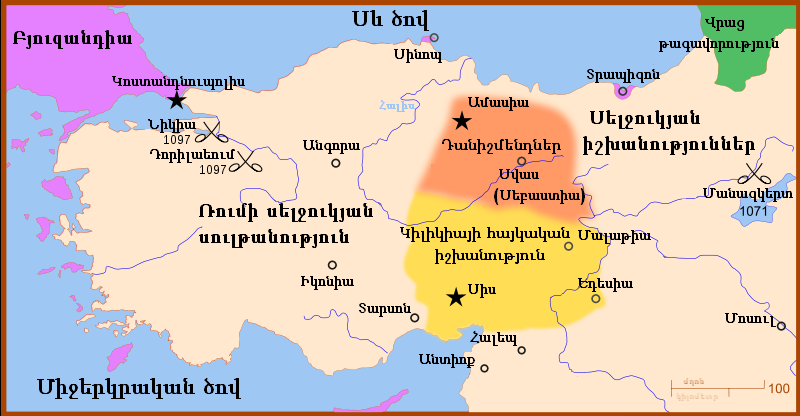 Փոքր Ասիան 1097 թ-ին